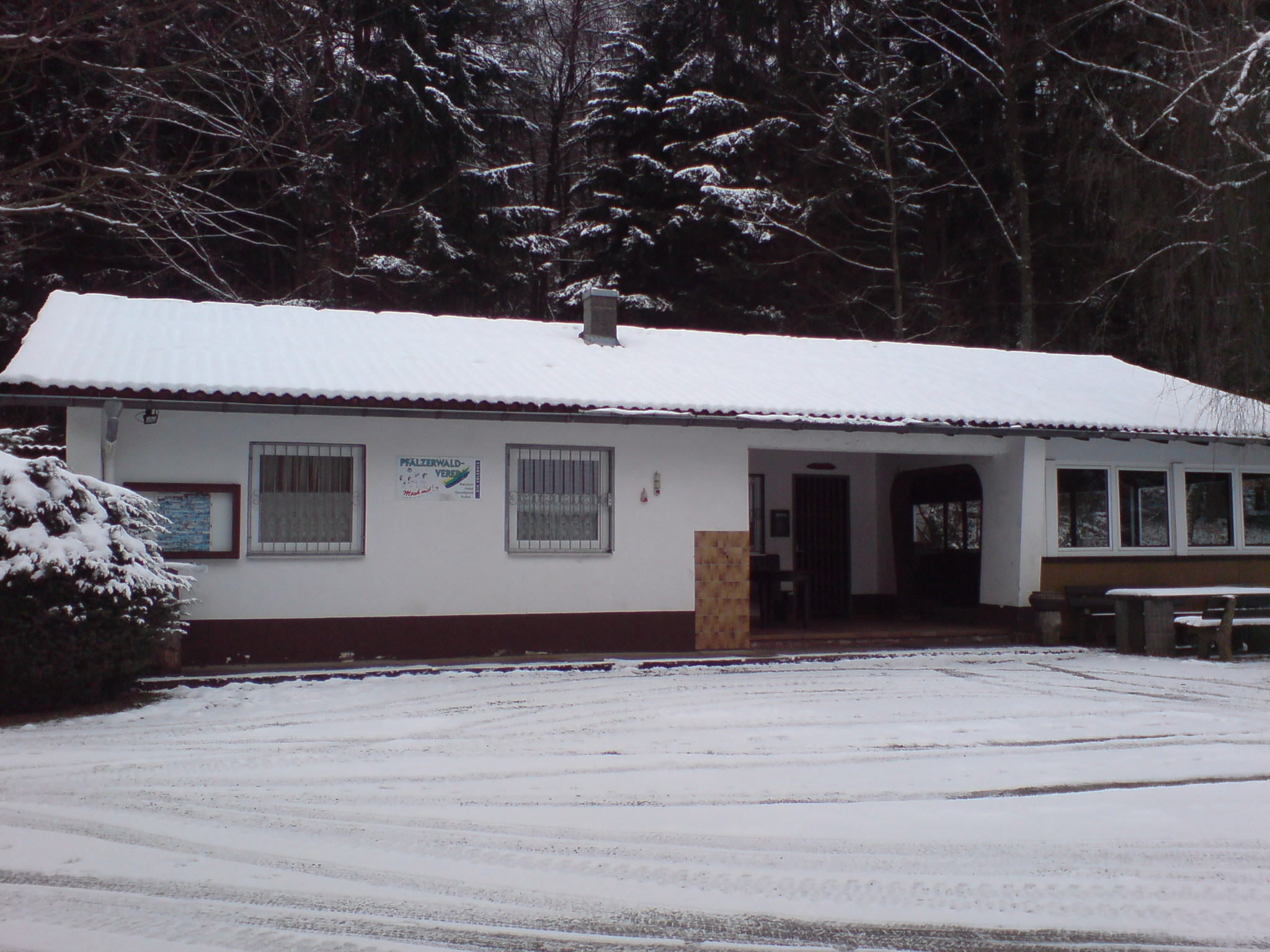 Die Fritz-Claus Hütte des PWV Vereins in Münchweiler an der Rodalb.